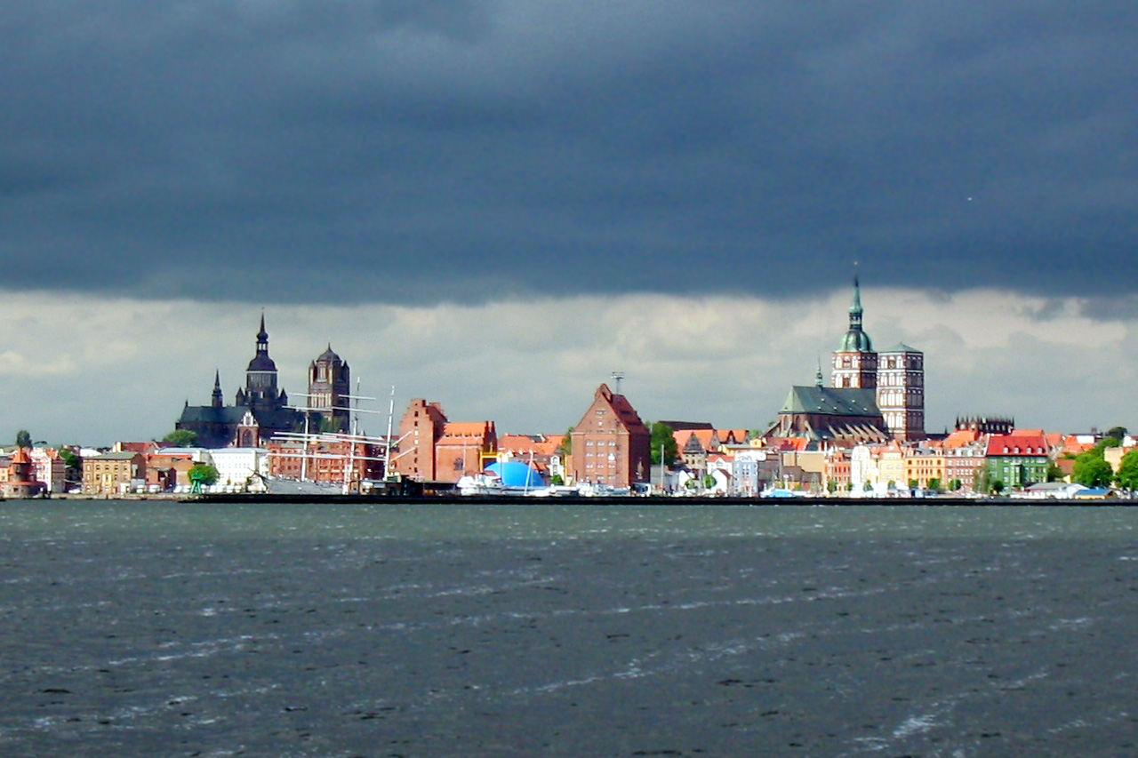 Stralsund - Stadtpanorama vom Meer aus